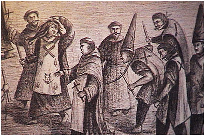 La Inquisicion en Lima. Camino hacia la Plaza Mayor de Lima para su condena.